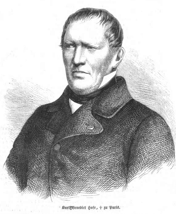 Porträt des deutschen Gräzisten Karl Benedikt Hase.